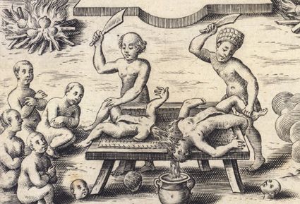 Indios als Kannibalen (detail)